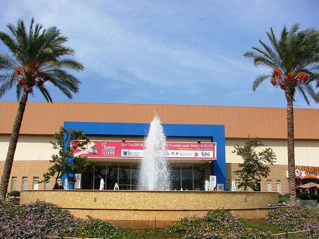 In questi giorni negli spazi espositivi di Biel si svolge la manifestazione "Salone del libro della francofonia di Beirut"